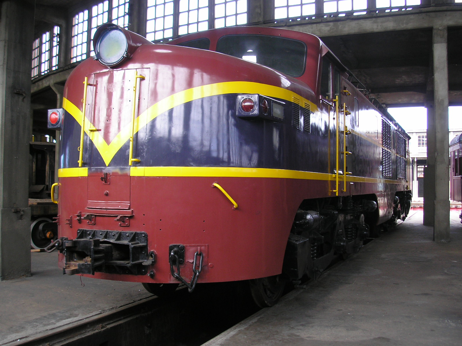 Locomotora eléctrica Breda Marelli N° E-3226 de fabricación italiana, en la Casa de Máquinas de Temuco. This is a photo of a national monument in Chile: 161